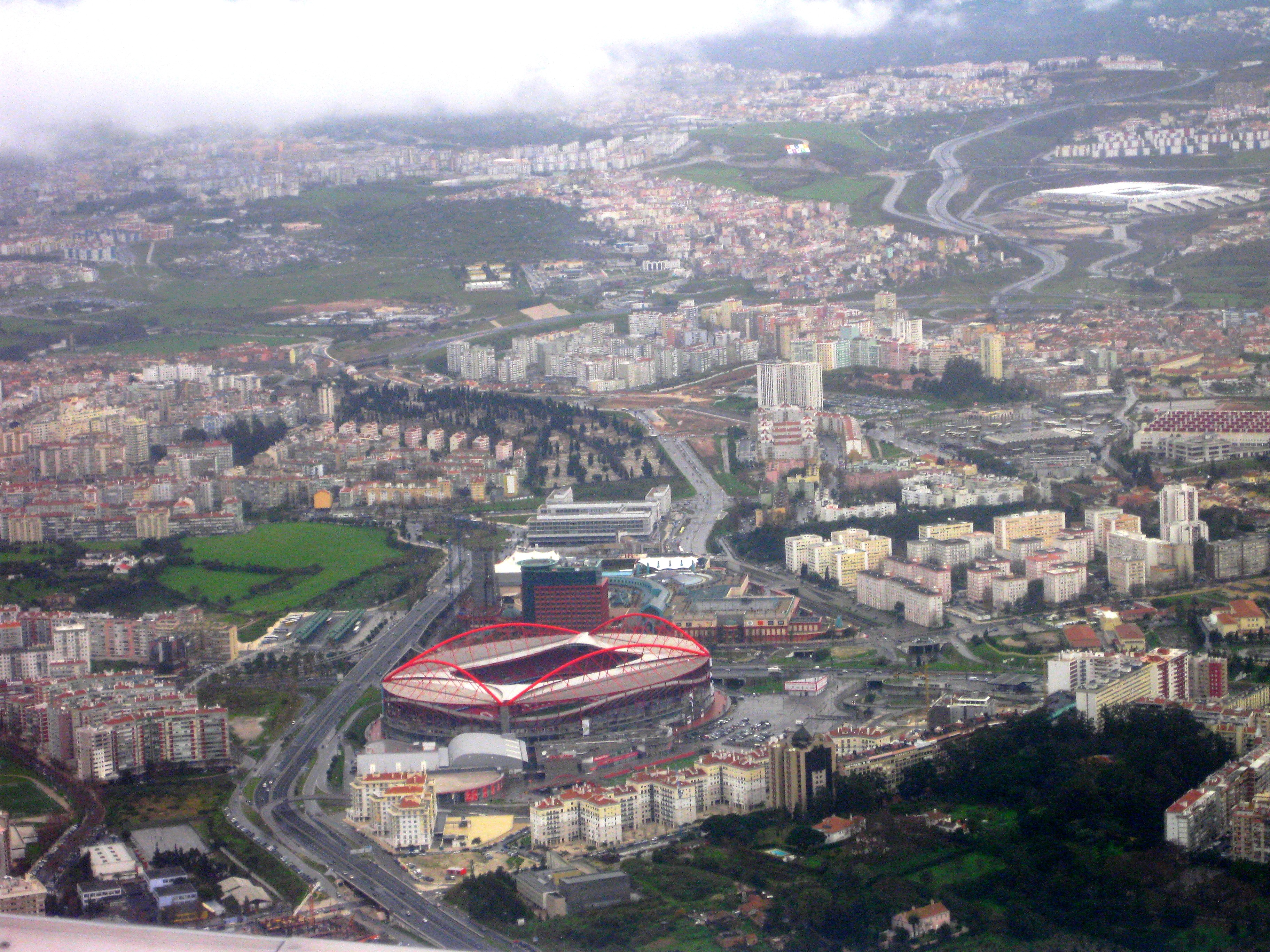 Estadio da Luz vista do ar !